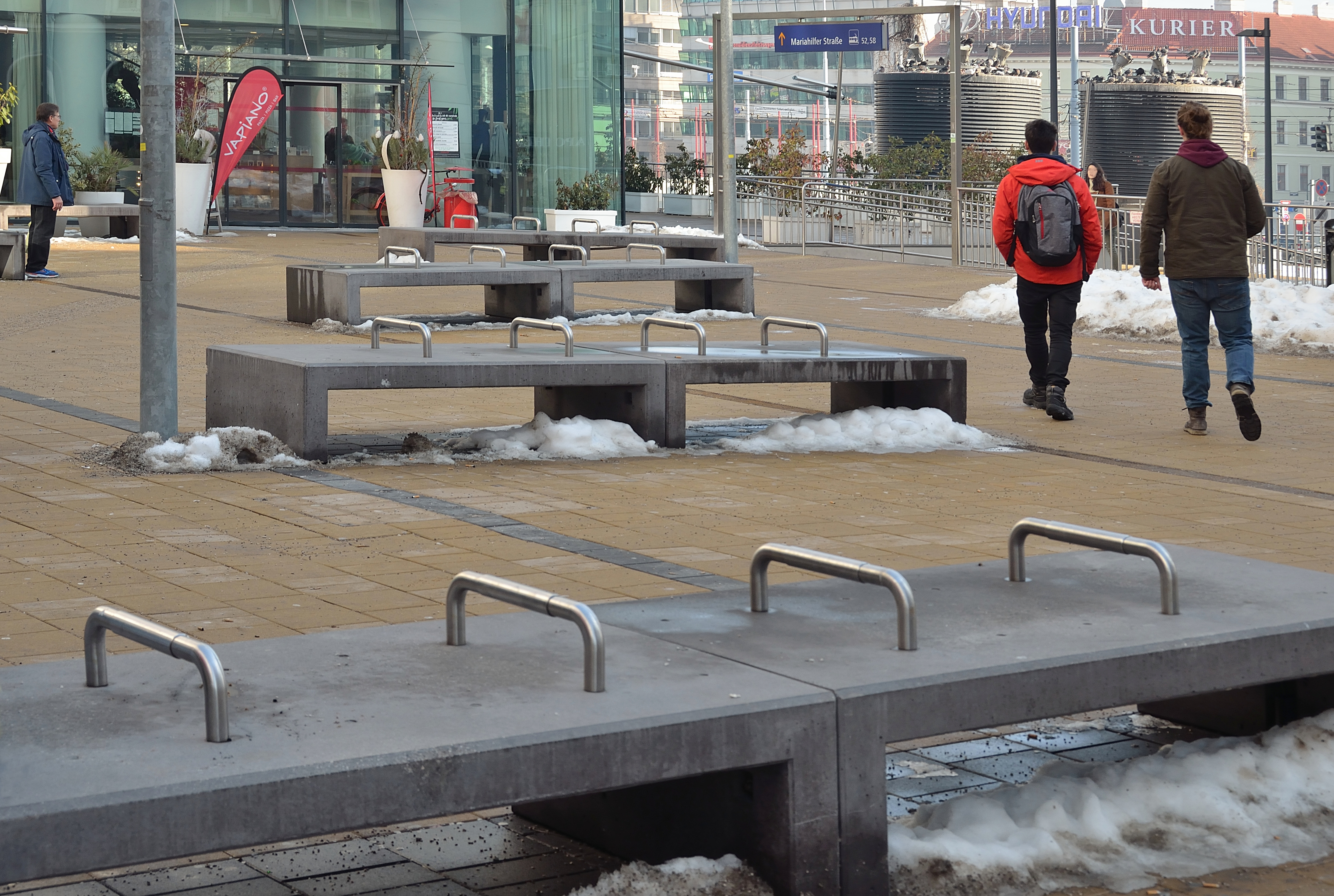 Bänke vor dem Westbahnhof, Wien, mit Bügeln, um das Liegen zu verhindern.